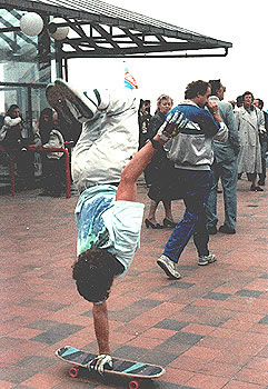 Handstand, Hans Smit (skater), Scheveningen (place) Foto door Hans Lucas